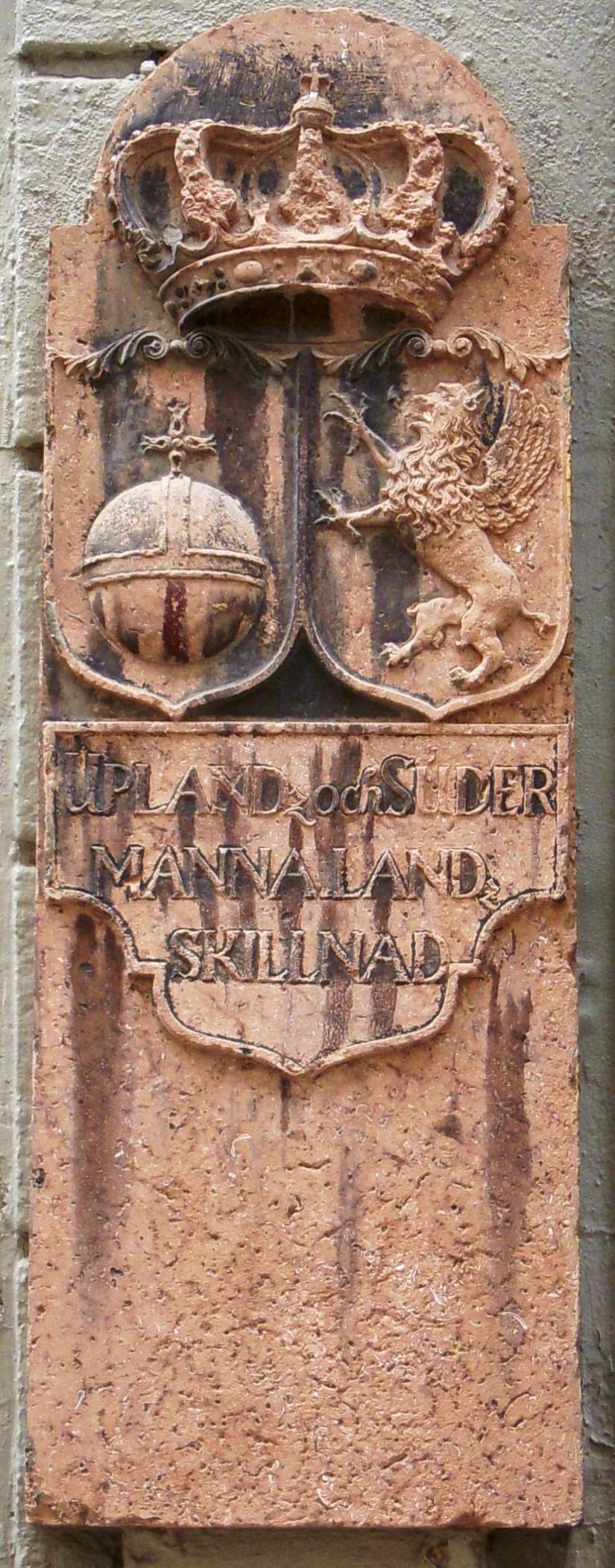 Gränssten på huset Västerlånggatan 27, Stockholm